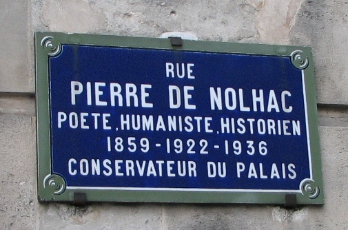 Plaque de la rue Pierre de Nolhac à côté du château de Versailles.